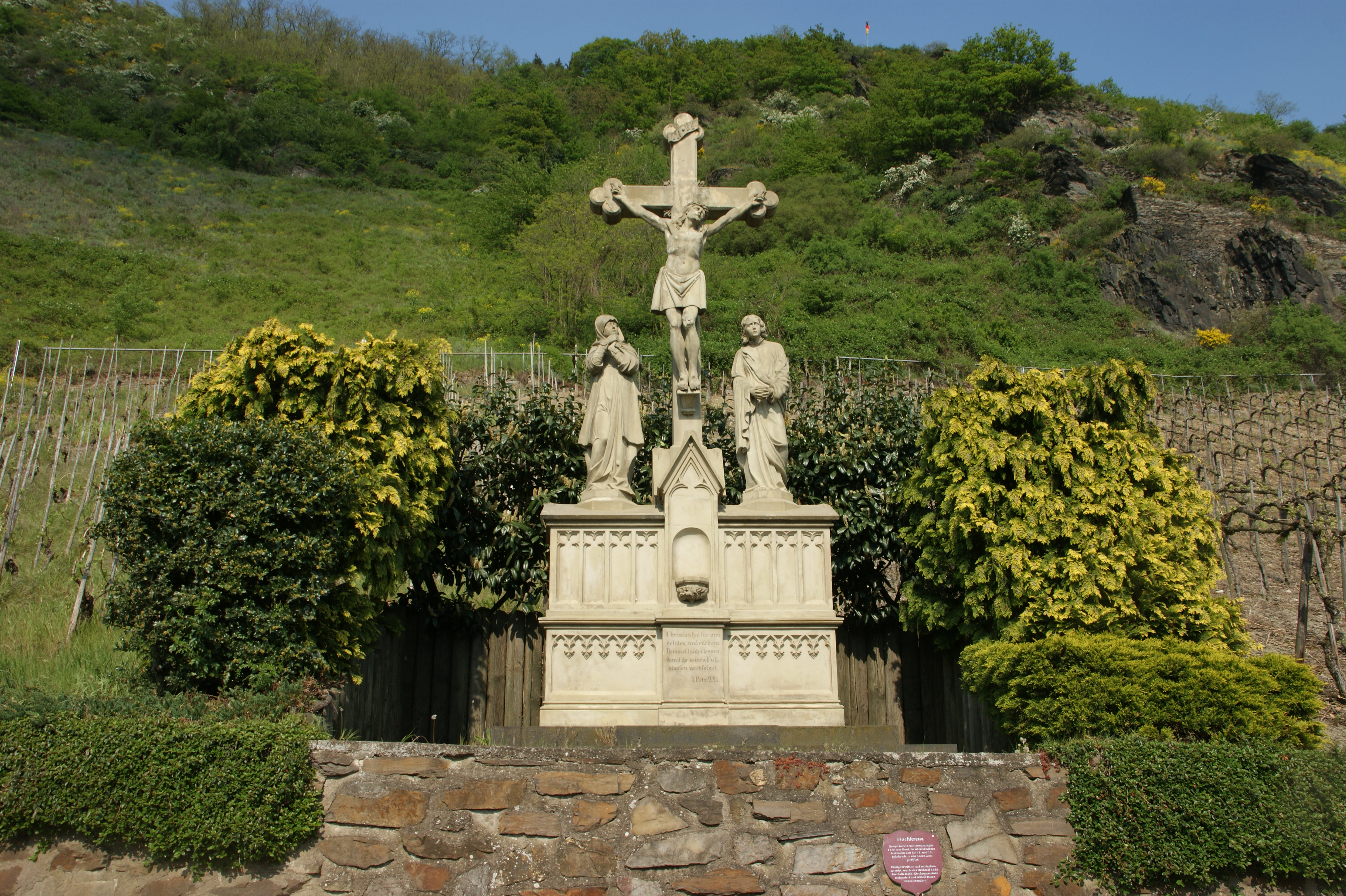 Hochkreuz in Leutesdorf